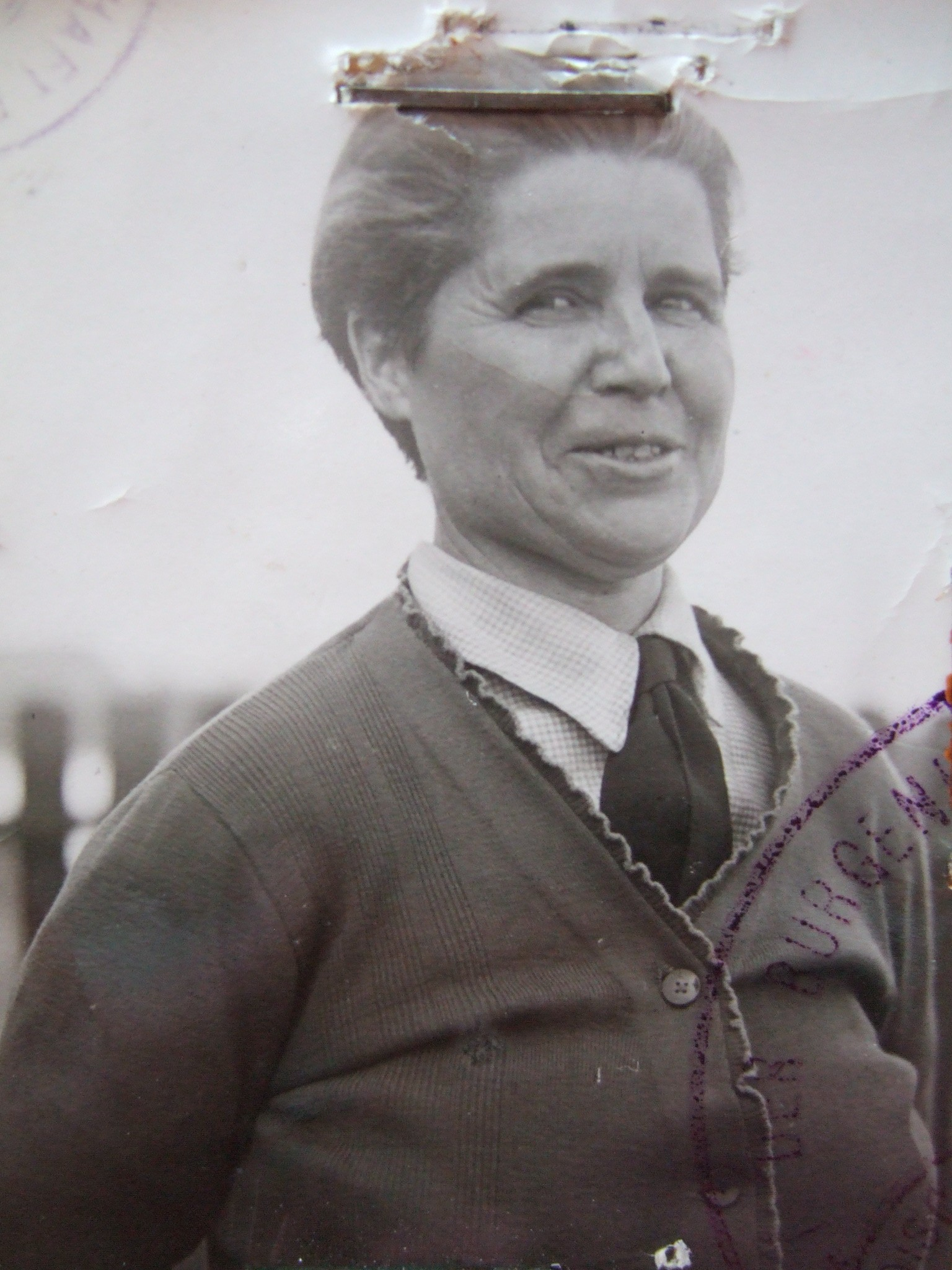 Source: Burgenländisches Landesarchiv